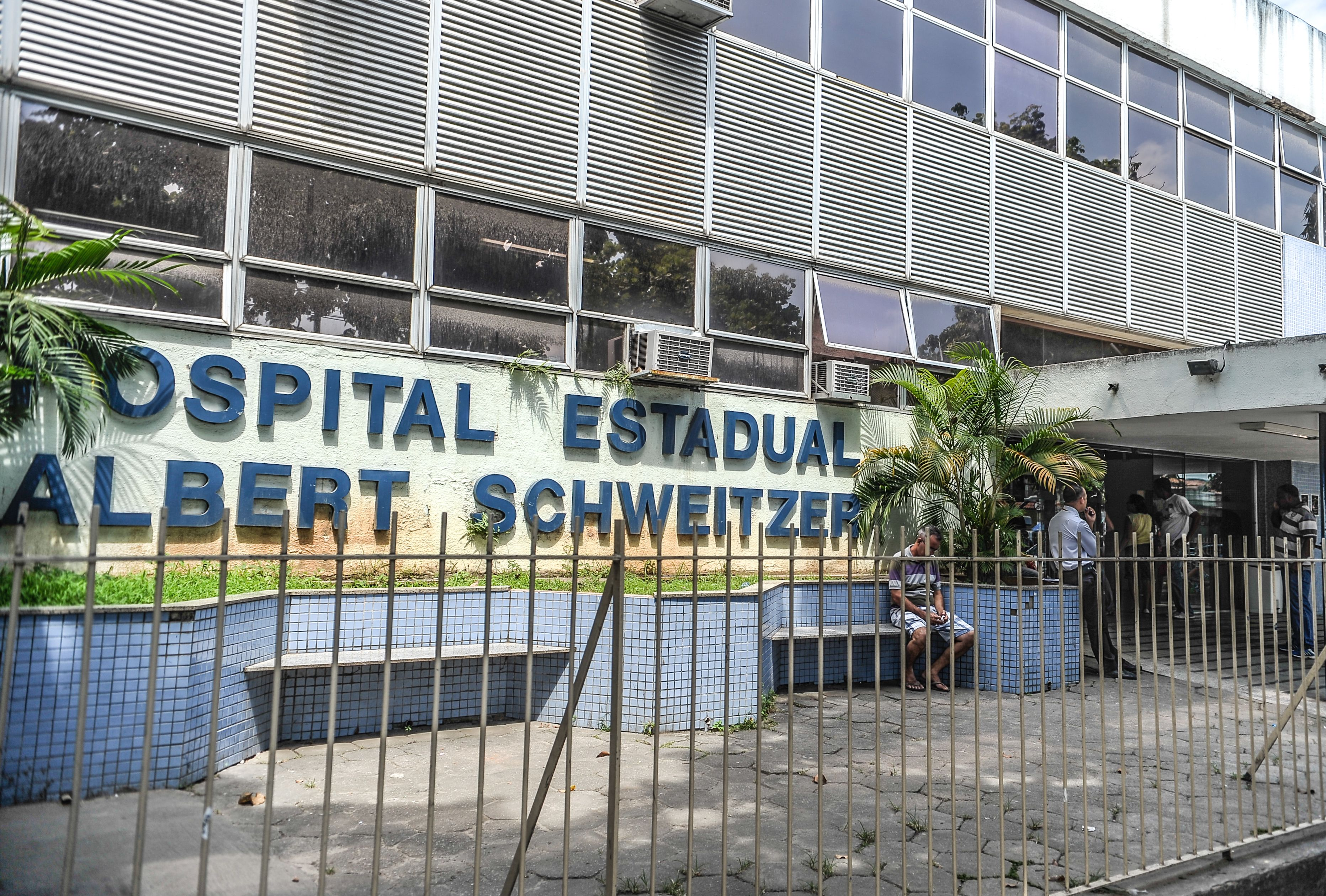 Rio de Janeiro - Hospital Albert Schweitzer (Tomaz Silva/Agência Brasil)